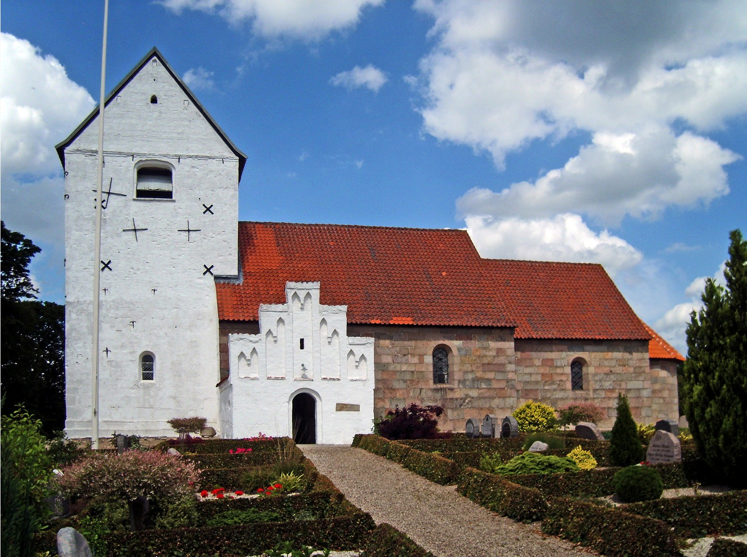 fra syd